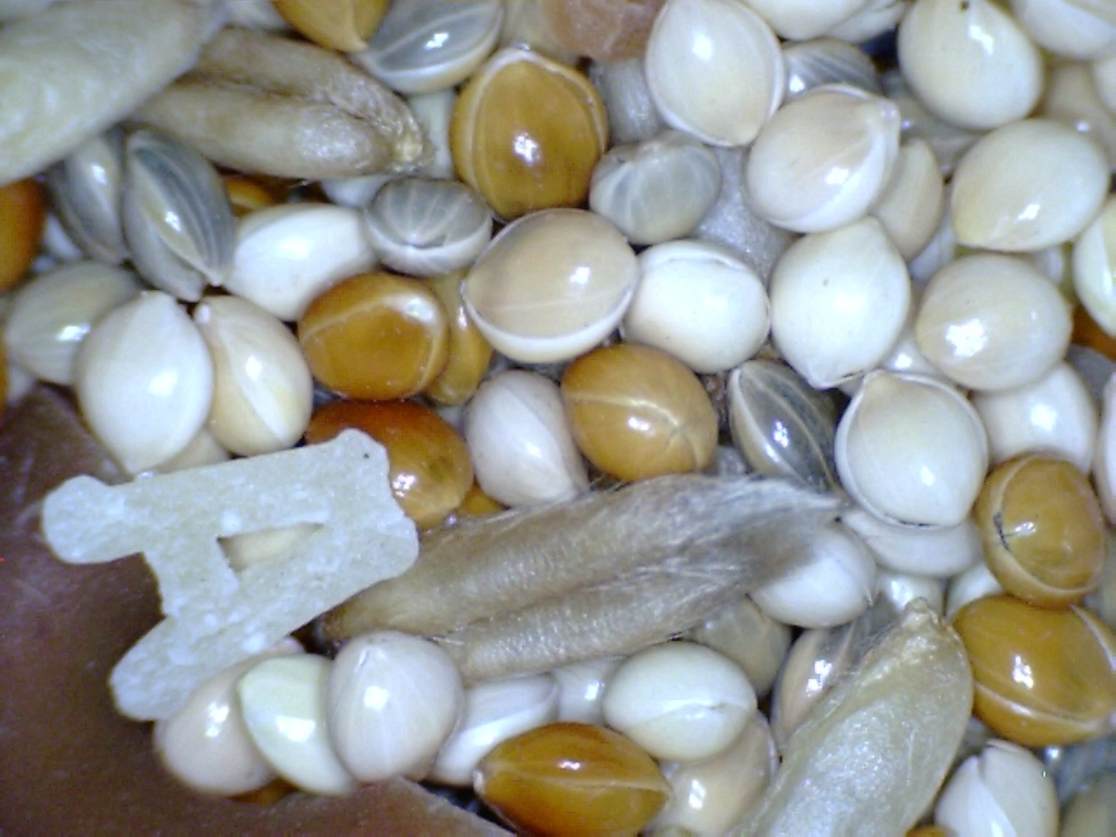 Kochfuttermischung für Sittiche stark vergrößert